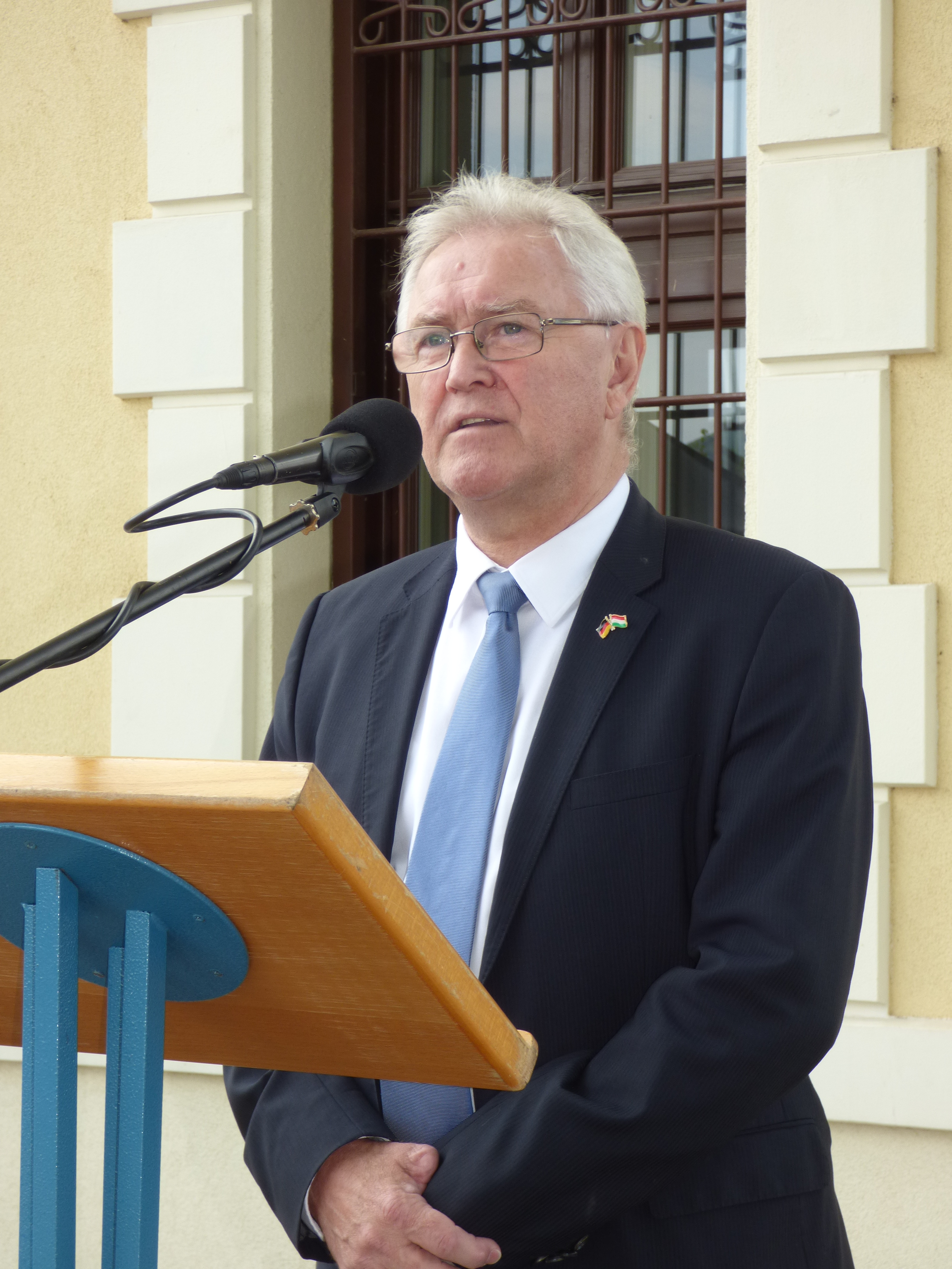 Kitelepítési emléktábla avatása a solymári vasútállomáson - Ritter Imre nemzetiségi szószóló